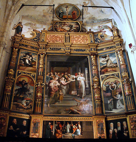 Retablo de la capilla del Mariscal de la catedral de Sevilla, (España).